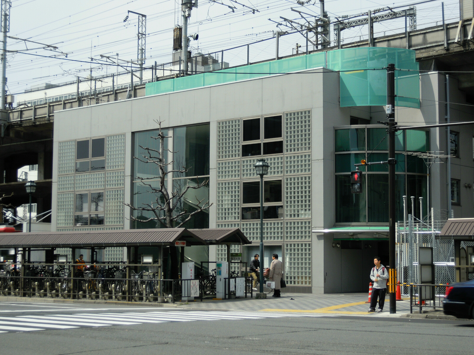 ジェイアール東海関西開発(京都市南区)